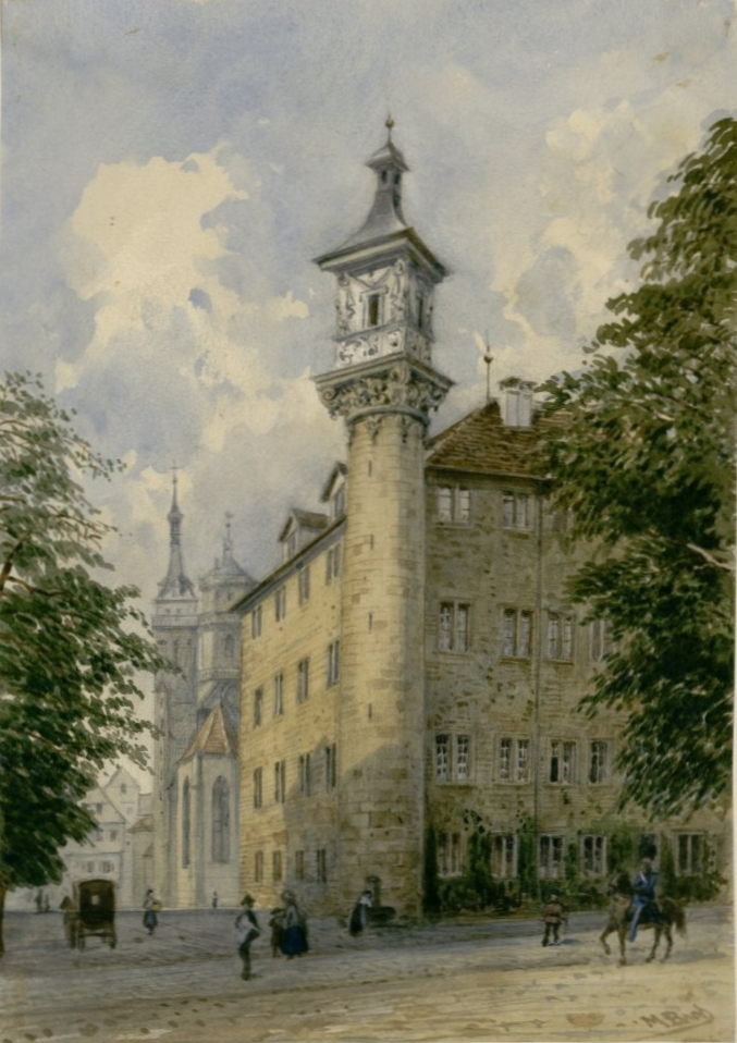 „Alte Kanzlei mit Wasserturm (= Merkursäule), Stuttgart Schloßplatz“, Ansicht vor 1862, Aquarell von Max Bach, 28,2 x 19,8 cm.